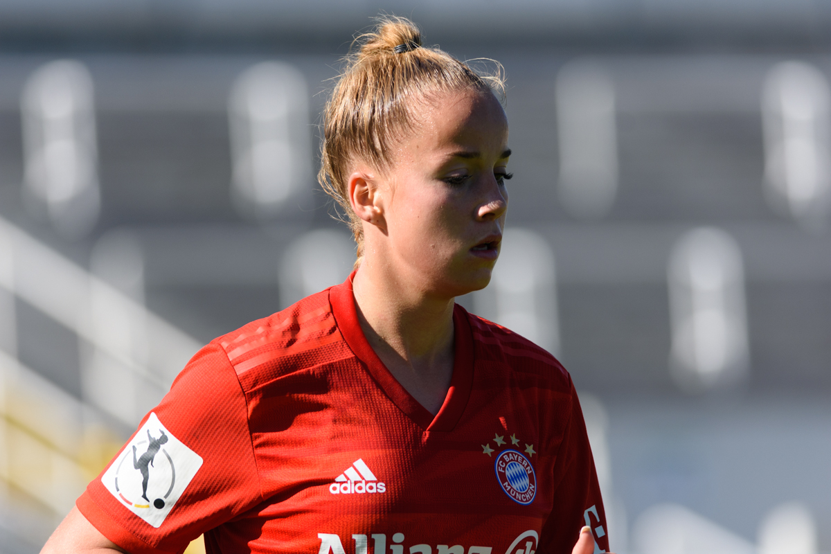 Giulia Gwinn during FC Bayern (women) vs Bayer Leverkusen (women), September 2019